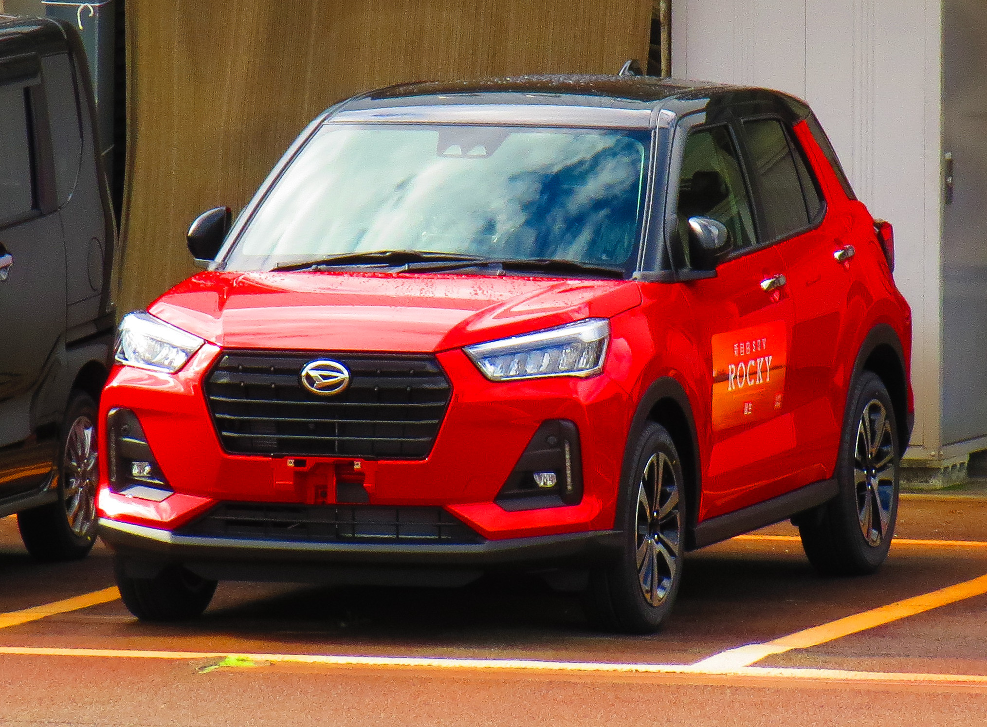 ダイハツ・ロッキー ダイハツ店にて